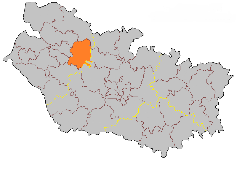 Кантон Аи-ле-О-Клоше в составе департамента Сомма